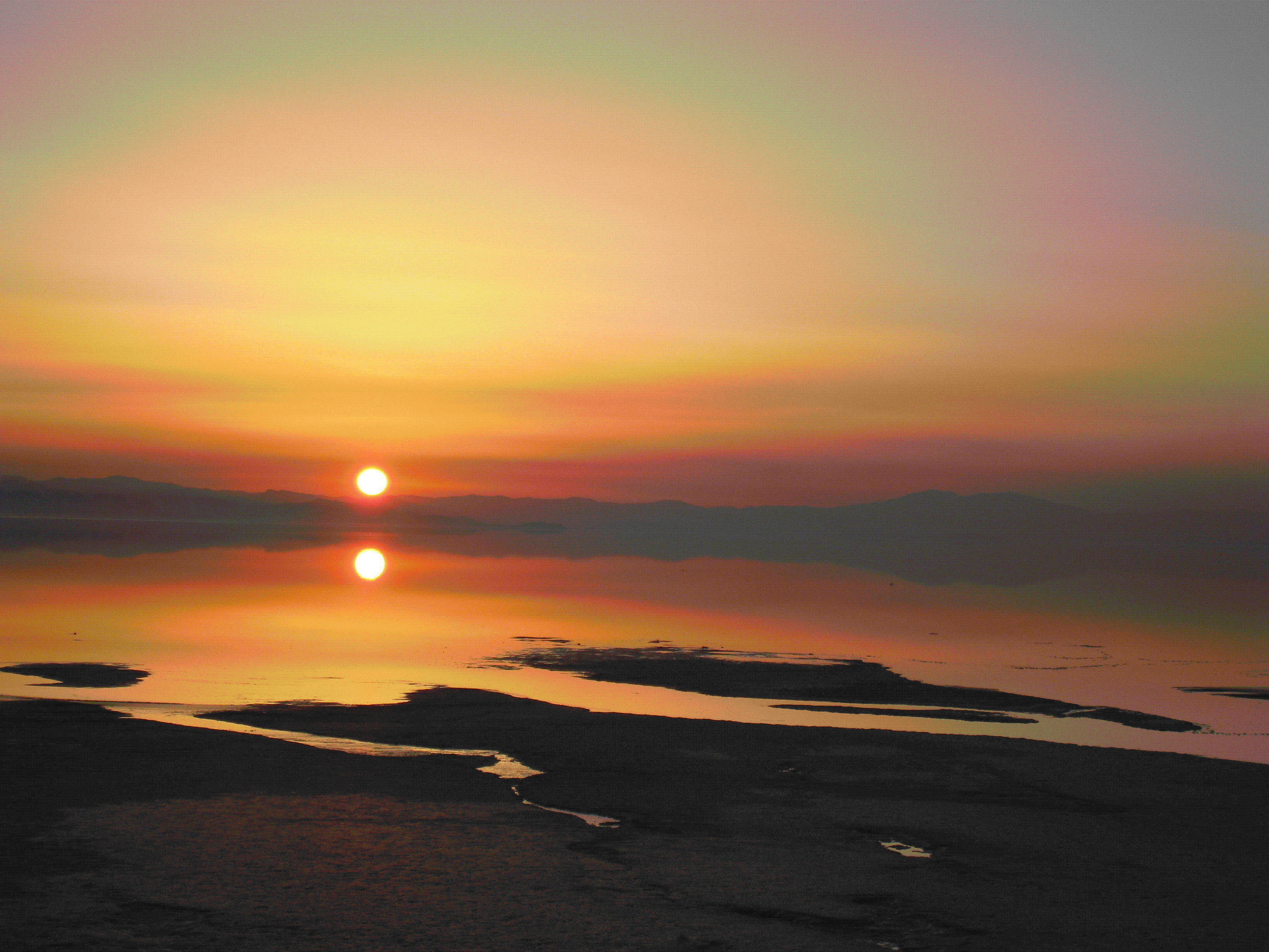 غروب زیبای ساحل دریاچه ارومیه در بندر شرفخانه شهرستان شبستر، استان آذربایجان شرقی ایران